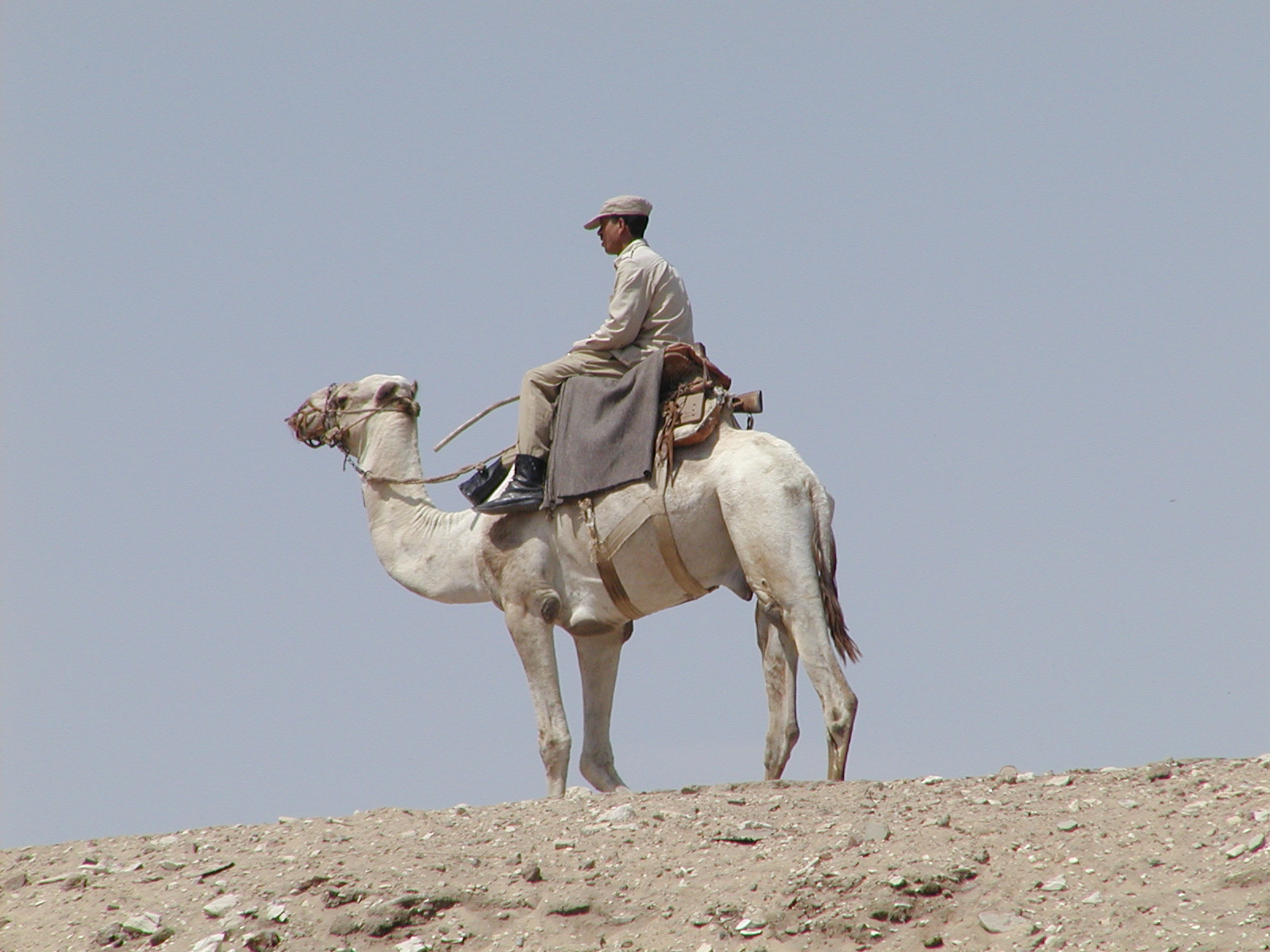 Un Medjaÿ surveille les alentours